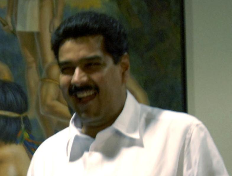 Nicolas Maduro